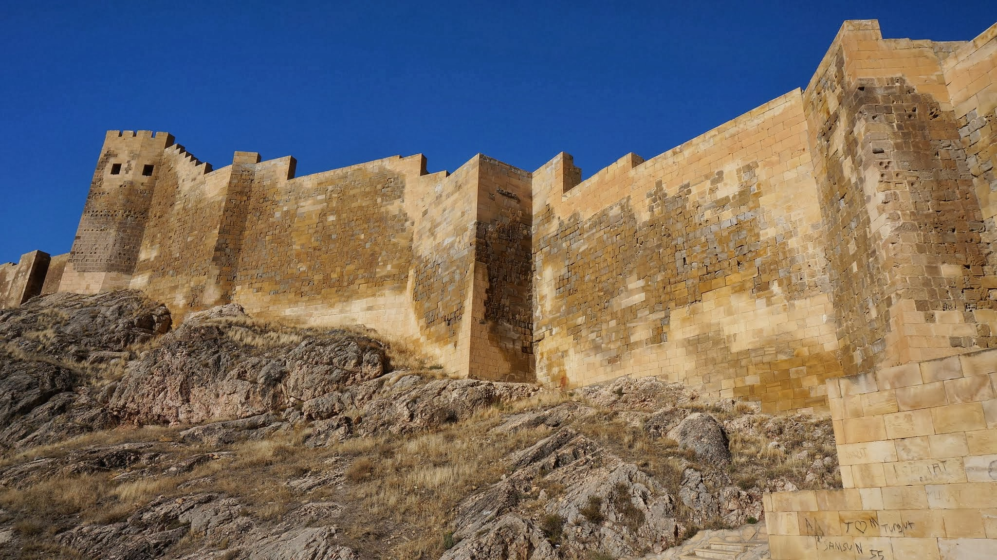 Bayburt, 69000 Bayburt Merkez/Bayburt, Turkey